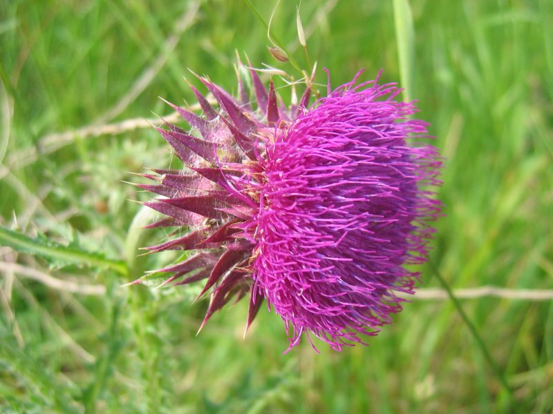 Nickende Distel (Carduus nutans), Gragetopshof